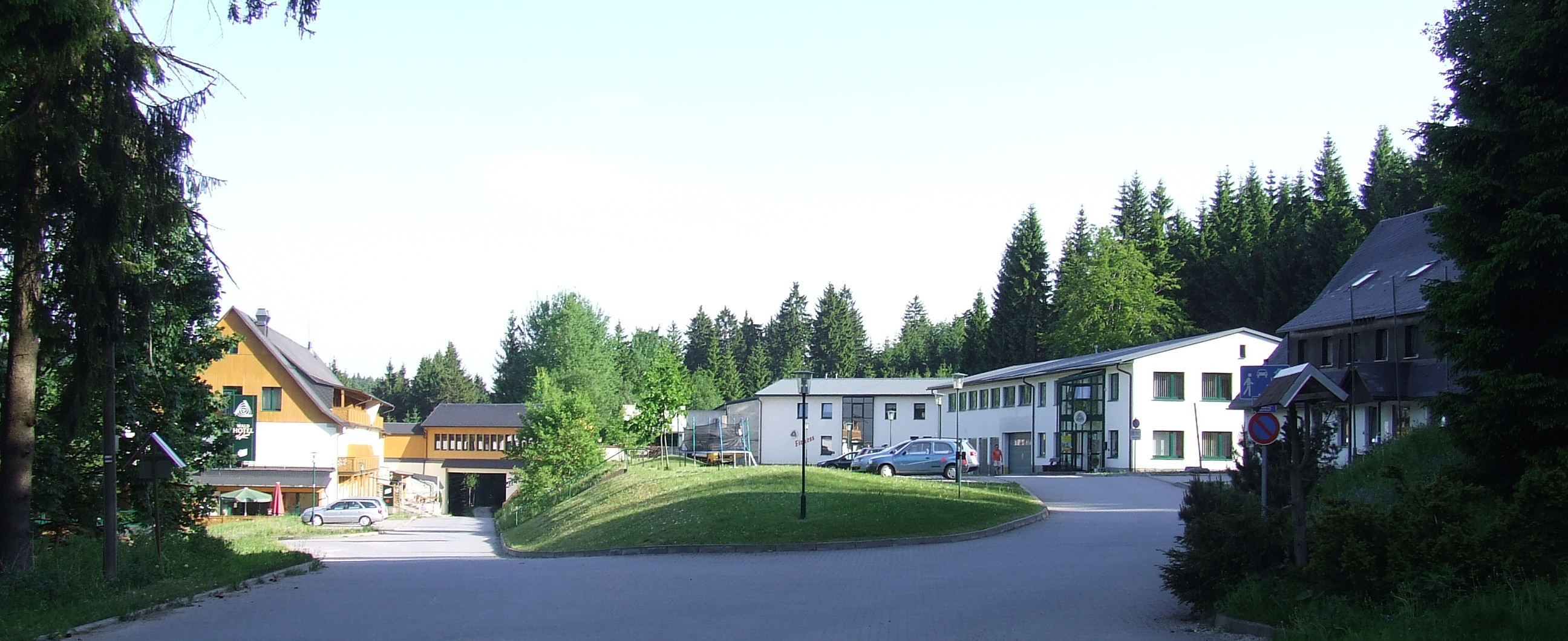 Zinnerzgrube Tannenberg - Mühlleithen